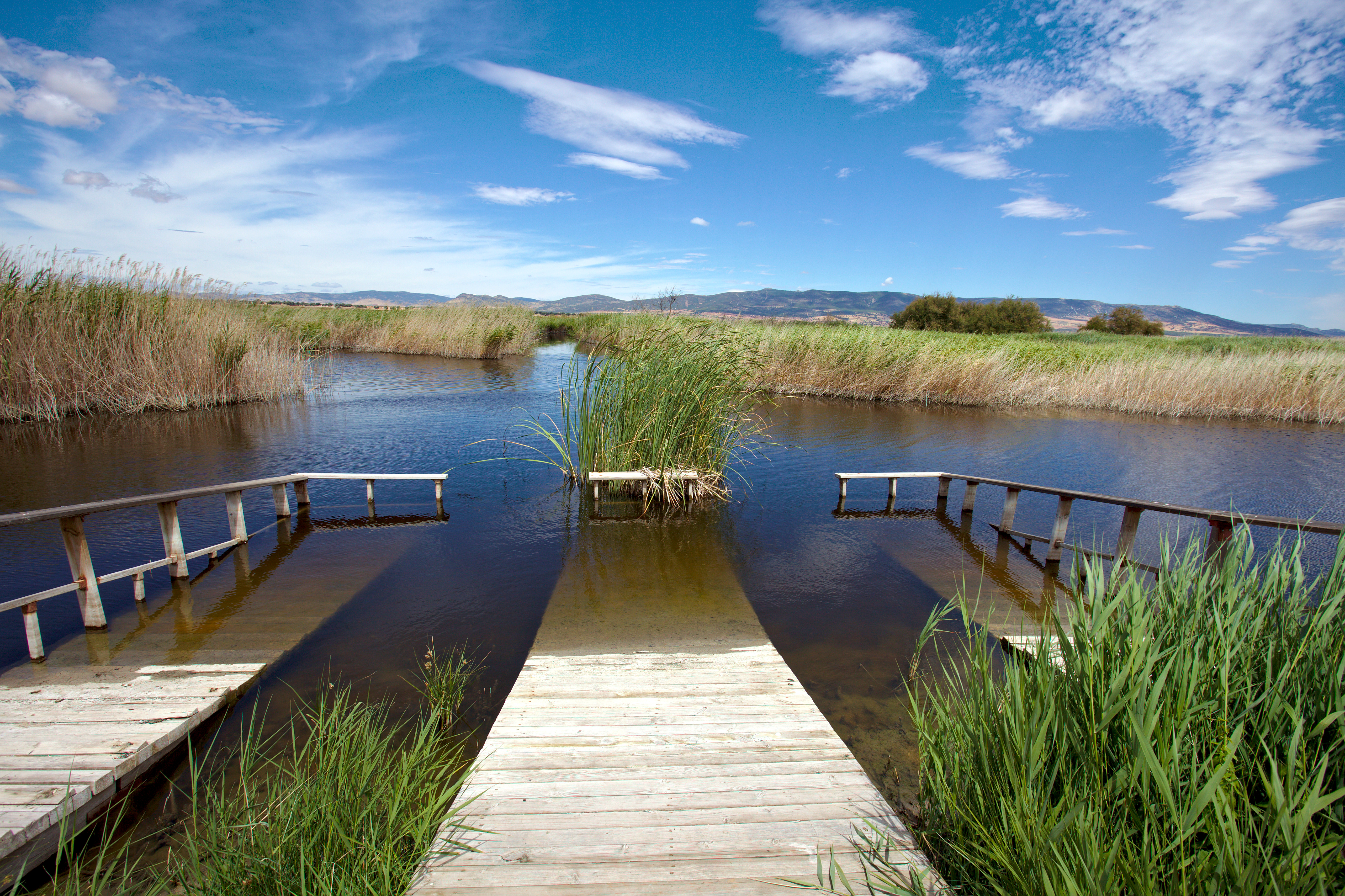 Embarcadero en la Tablas de Daimiel